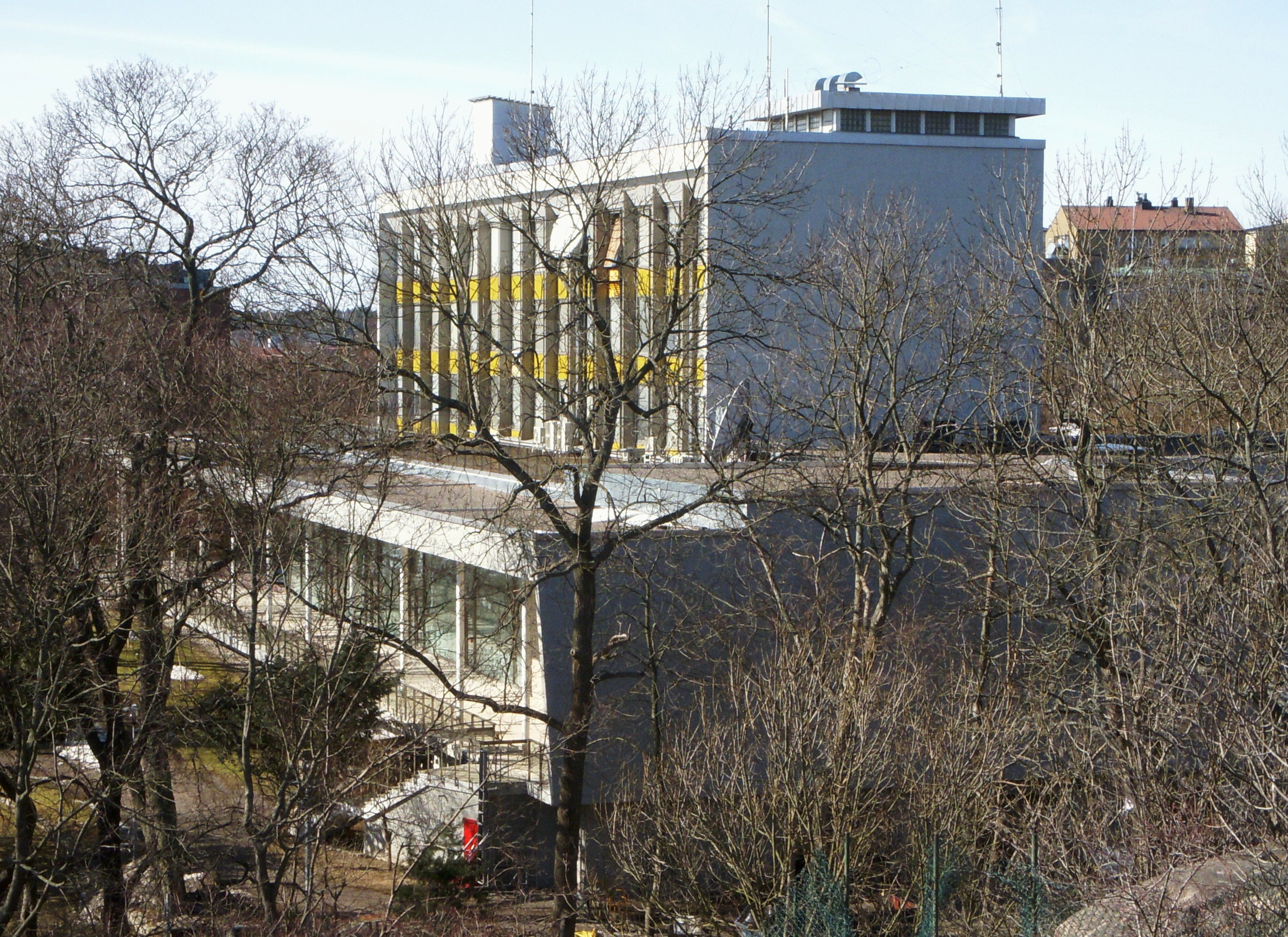 Rysslands ambassad i Stockholm, arkitekt Folke Löfström